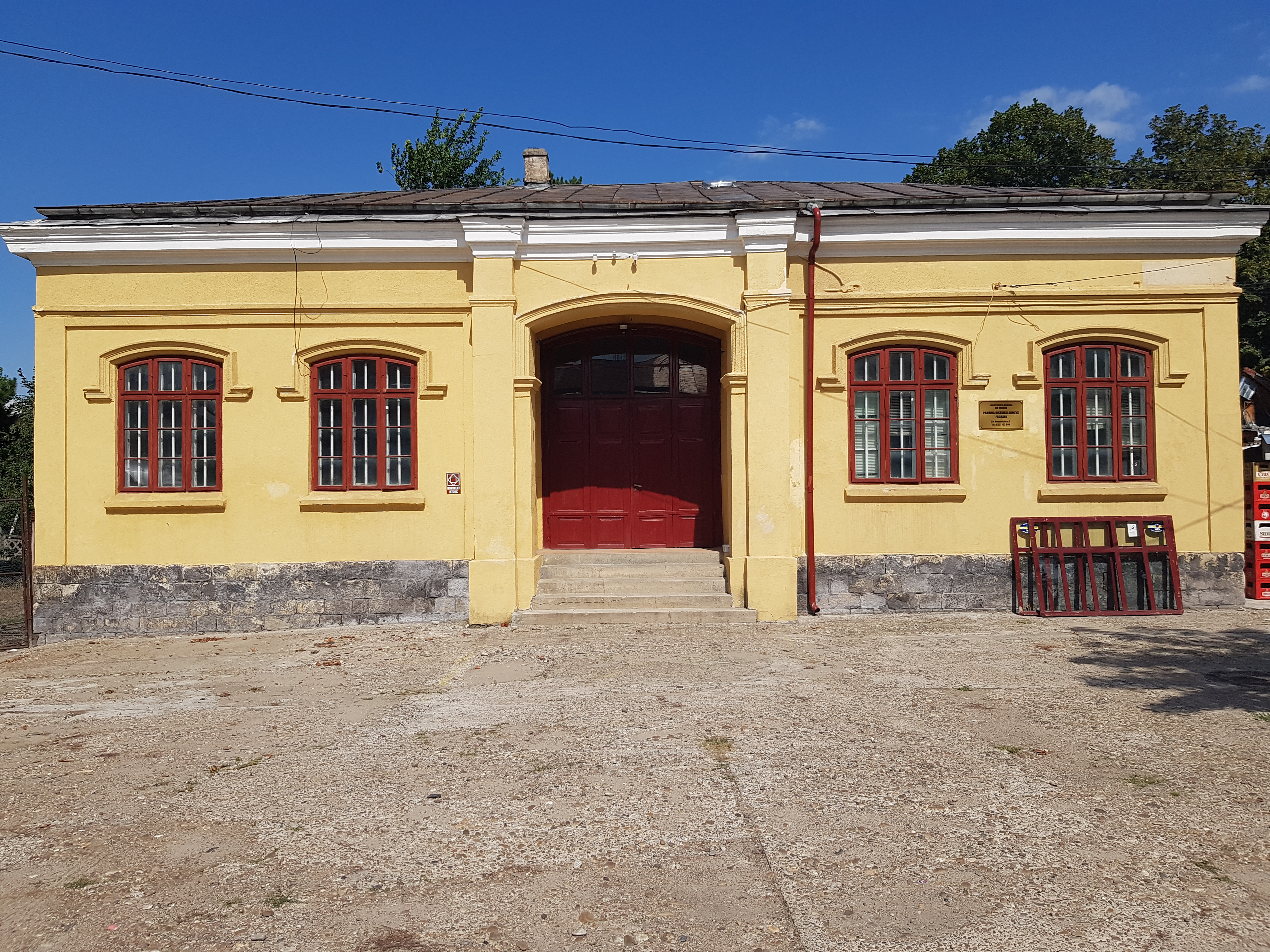 Școlile Armenești